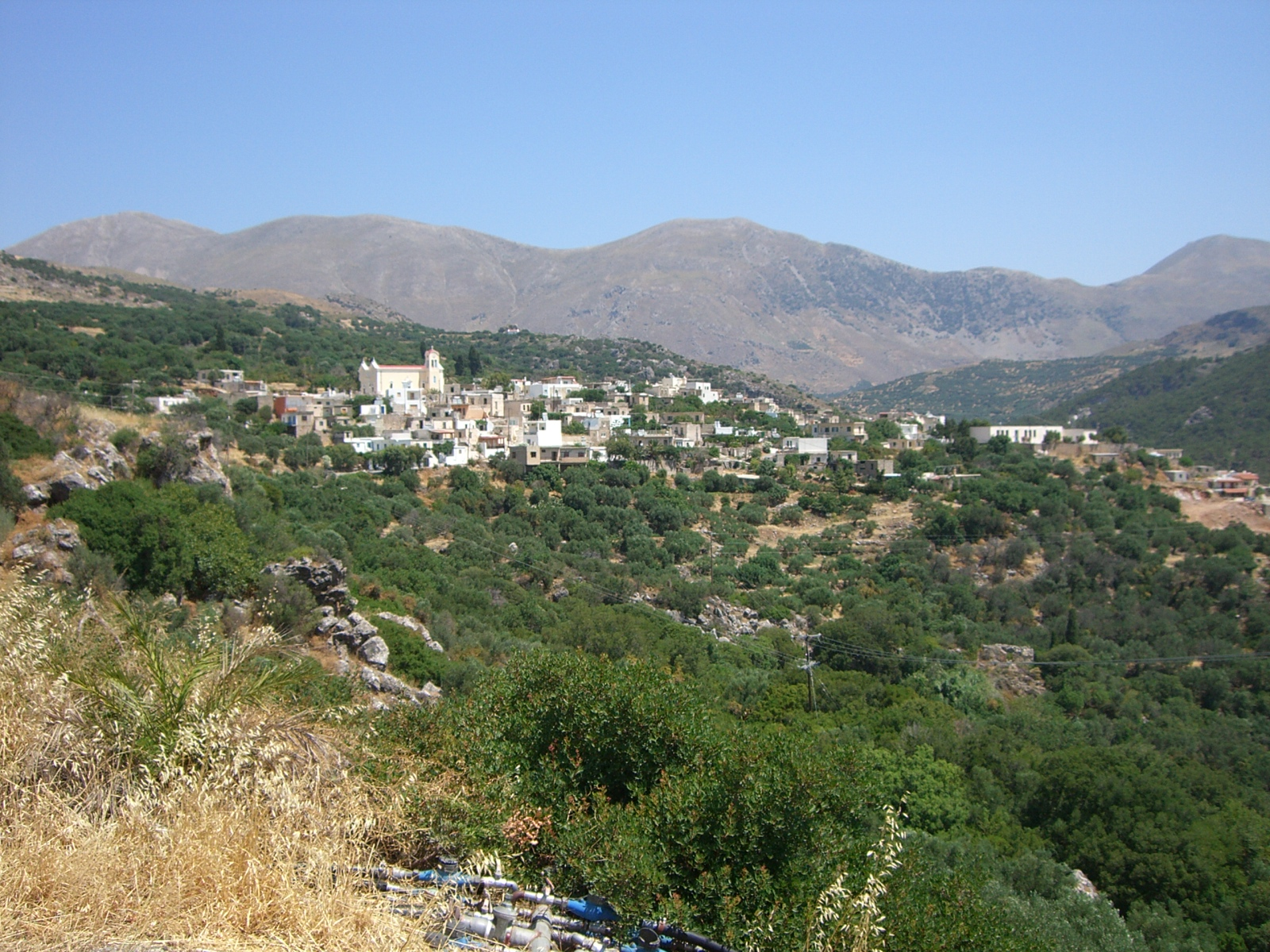 Blick auf Stavrochori auf Kreta